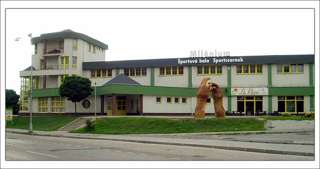 Sports Hall "Milénium", Nové Zámky